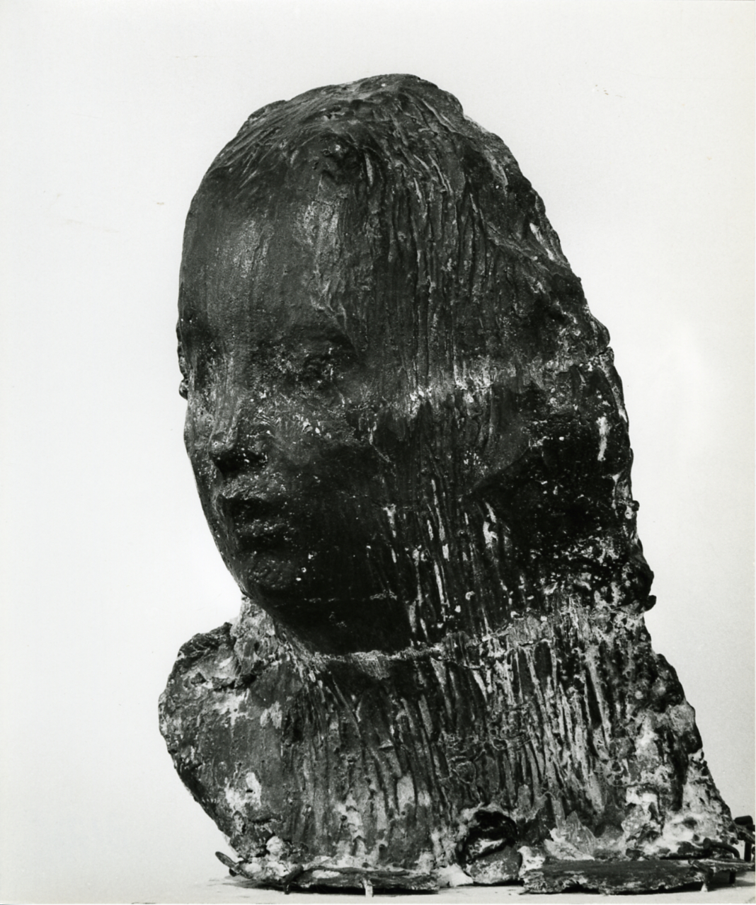 Servizio fotografico : Barzio, 1978 / Paolo Monti. - Stampe: 5 : Positivo b/n, gelatina bromuro d'argento/ carta, 24x30. - ((Al verso delle stampe manoscritto numero di negativo corrispondente: 3177. Sul coperchio della scatola manoscritto a pennarello nero: "Medardo Rosso". - Occasione: Documentazione per la pubblicazione del catalogo: "Medardo Rosso, 1858-19" , Ed. Der Kunstverein, 1984. - Fonte: Agenda di Paolo Monti: Nikon Leika 3001-/ Monti 1978 (1978-1982), presso Archivio Paolo Monti